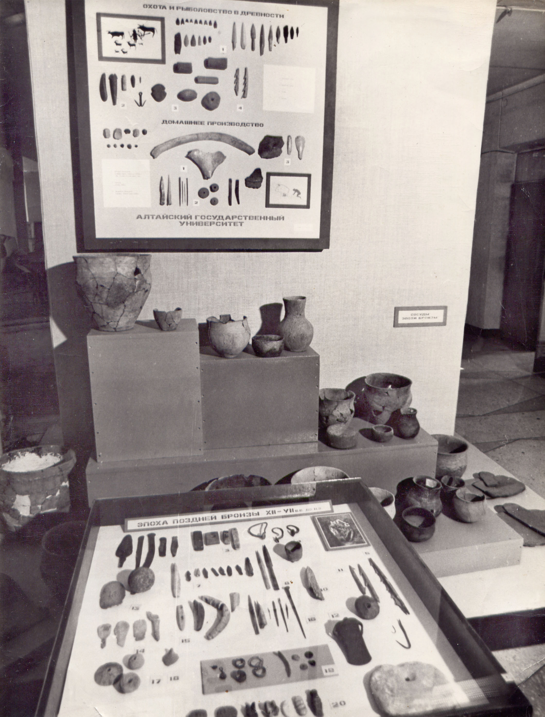 Один из первых вариантов экспозиции Музея археологии и этнографии Алтая